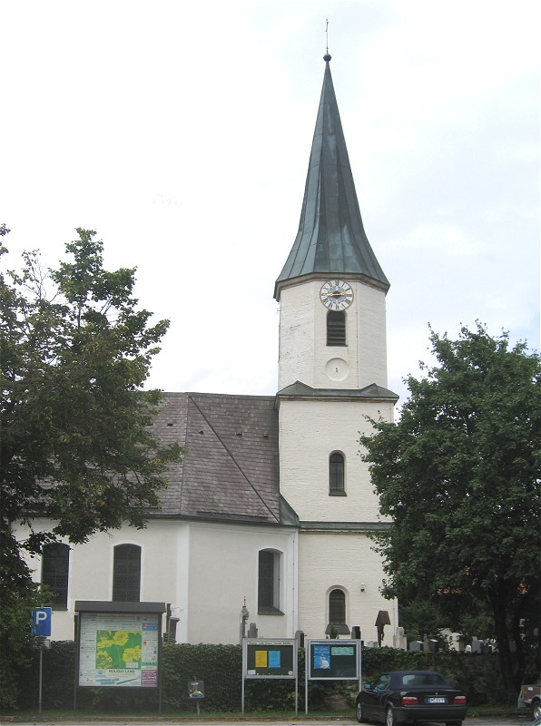 Kirche St. Nikolaus in Brunnthal